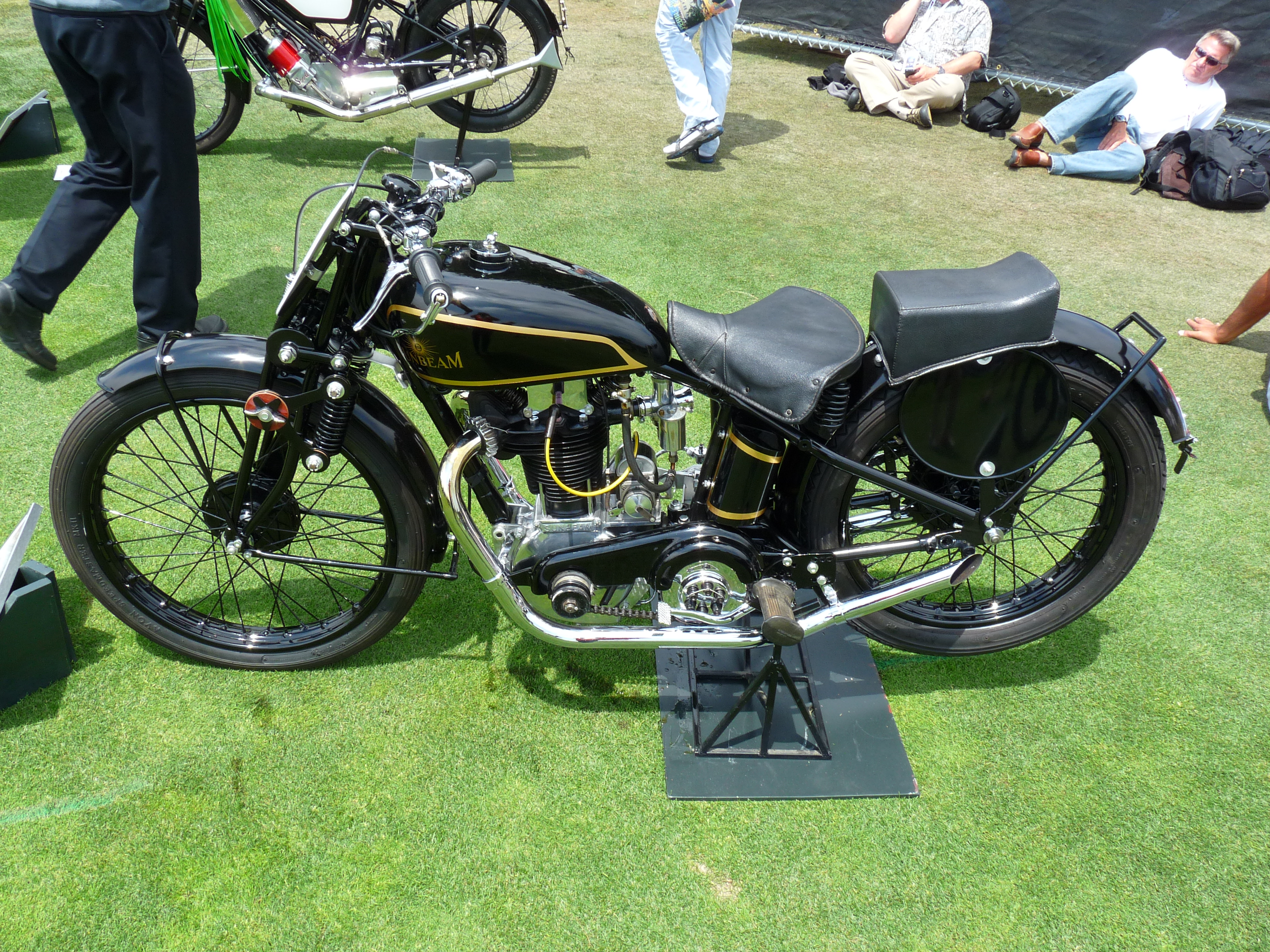 1929 Sunbeam Model 90 racer